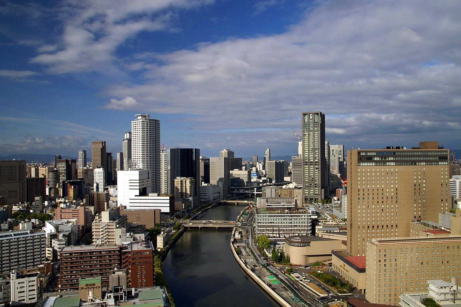 Dojima-Gawa (Kyu-Yodogawa) river, Osaka City, Japan